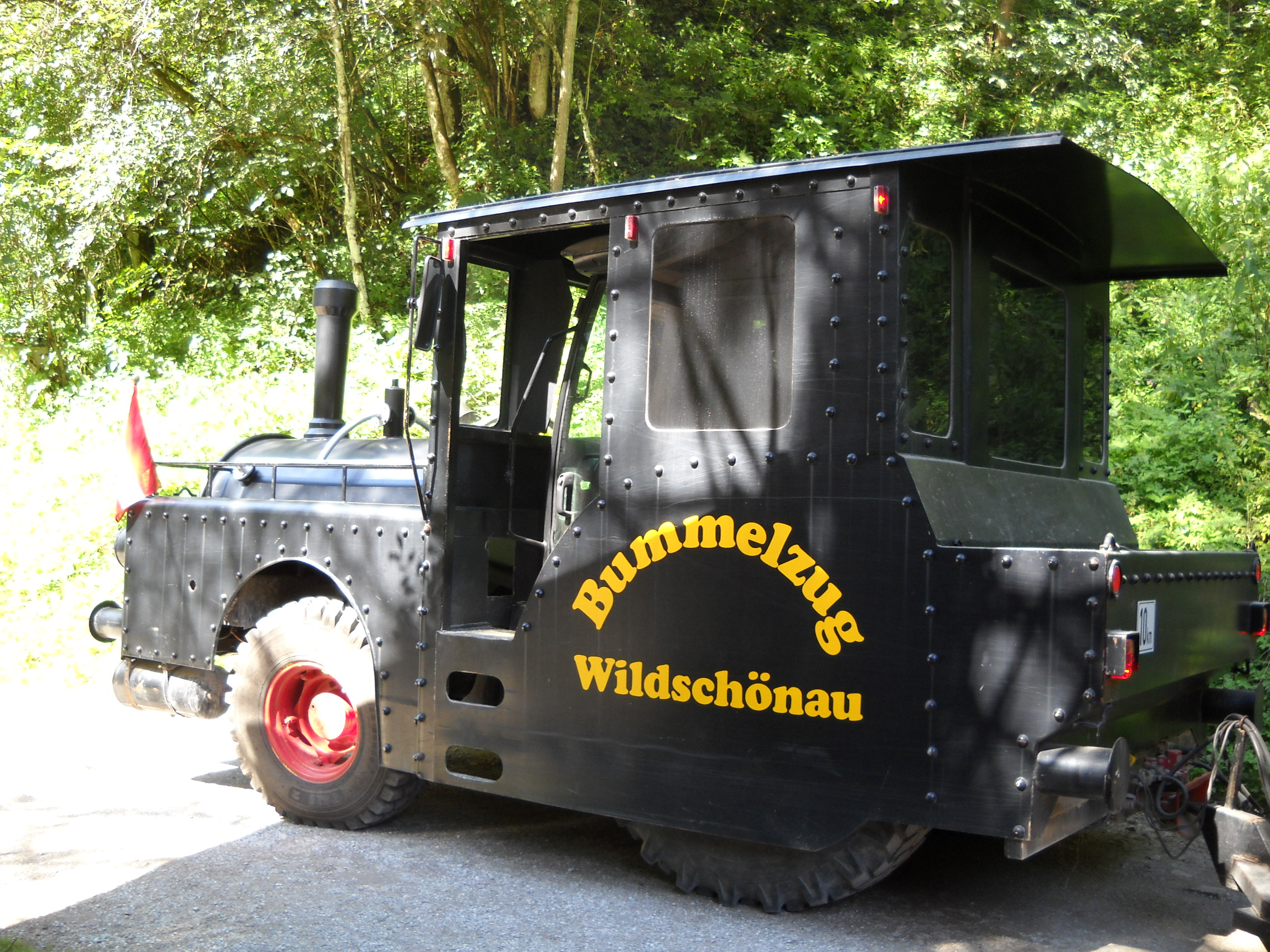 Wildschönau Bummelzug, Kundl Klamm